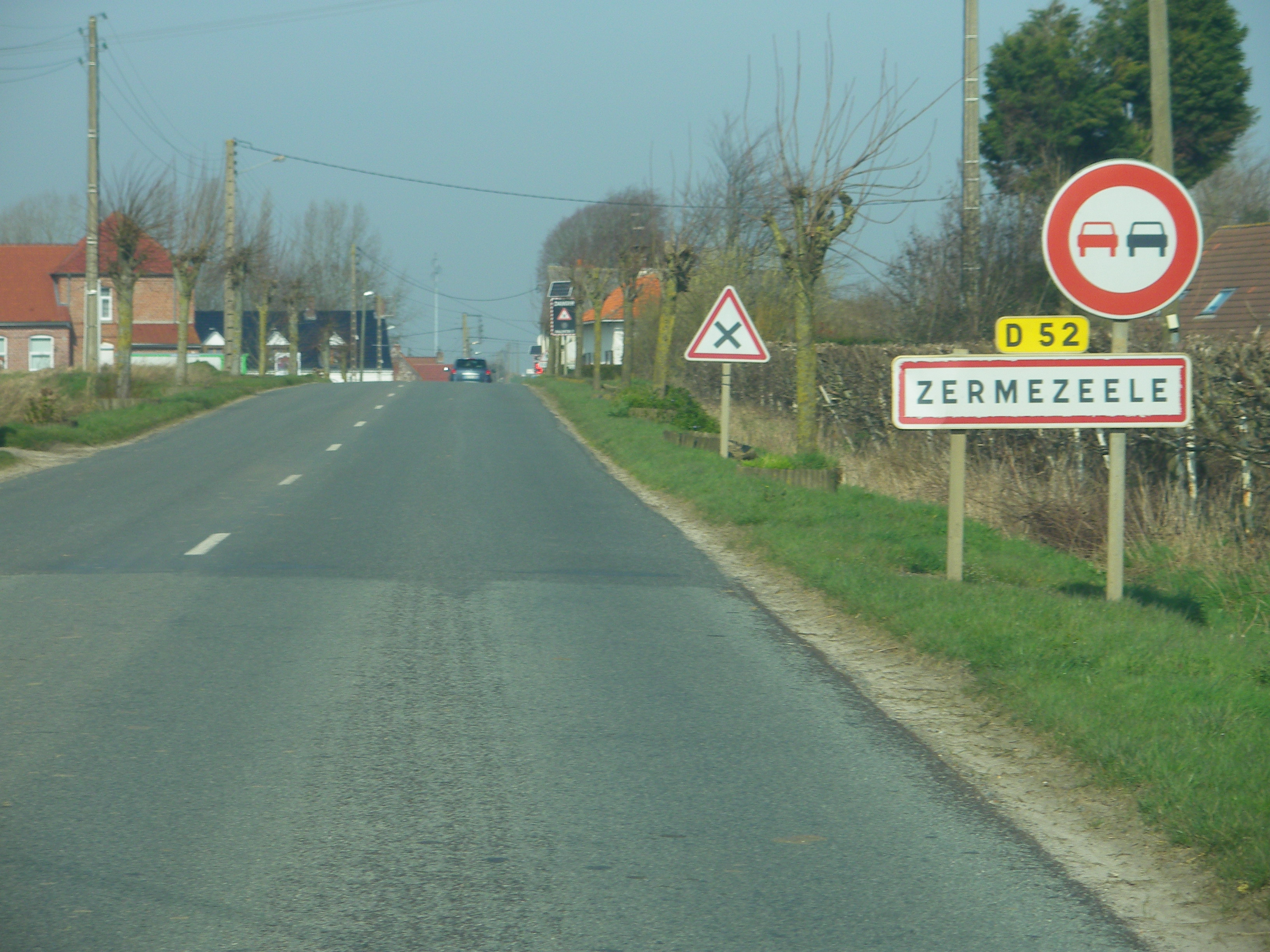 Entrée de la commune de Zermezeee.